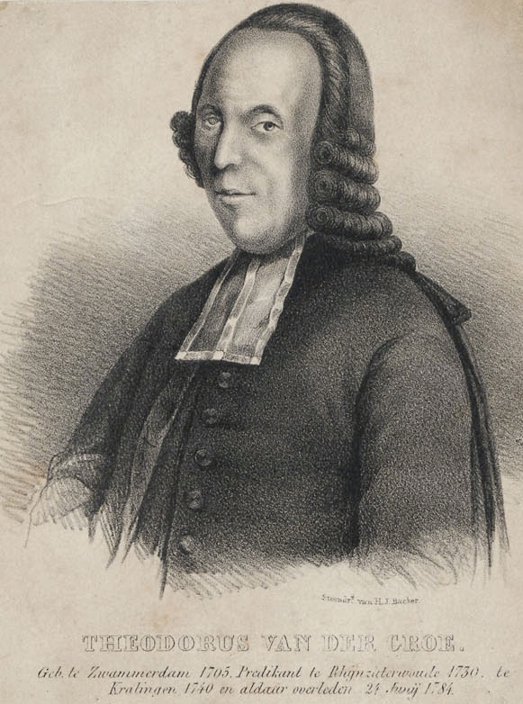 Theodorus van der Groe postuum portret door H.J. Backer